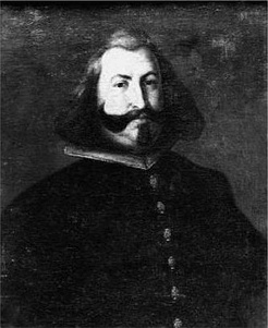 Retrato del Duque de Medina de las Torres, Ramiro Núñez de Guzmán.